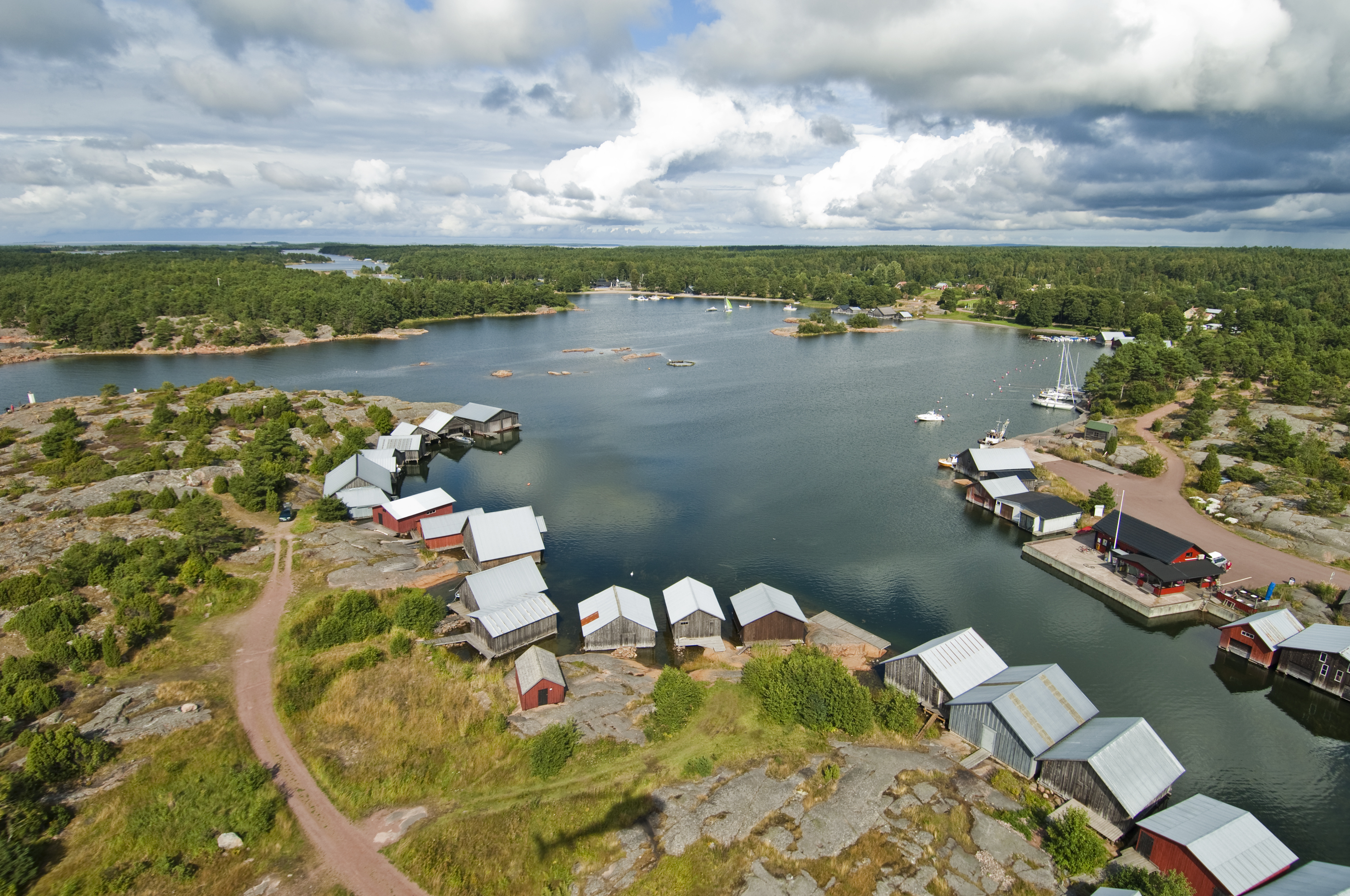 Copyright: Visit ÅLand. Käringsund in Eckerö on Åland.